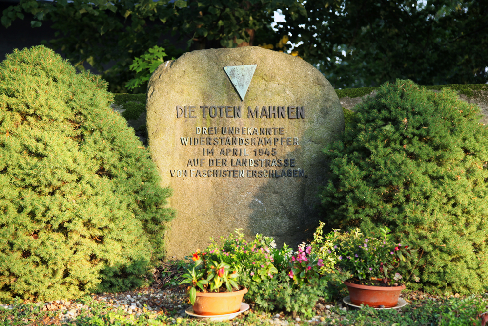 Dorfkirche Wallroda: Gedenkstätte für 3 unbekannte Soldaten